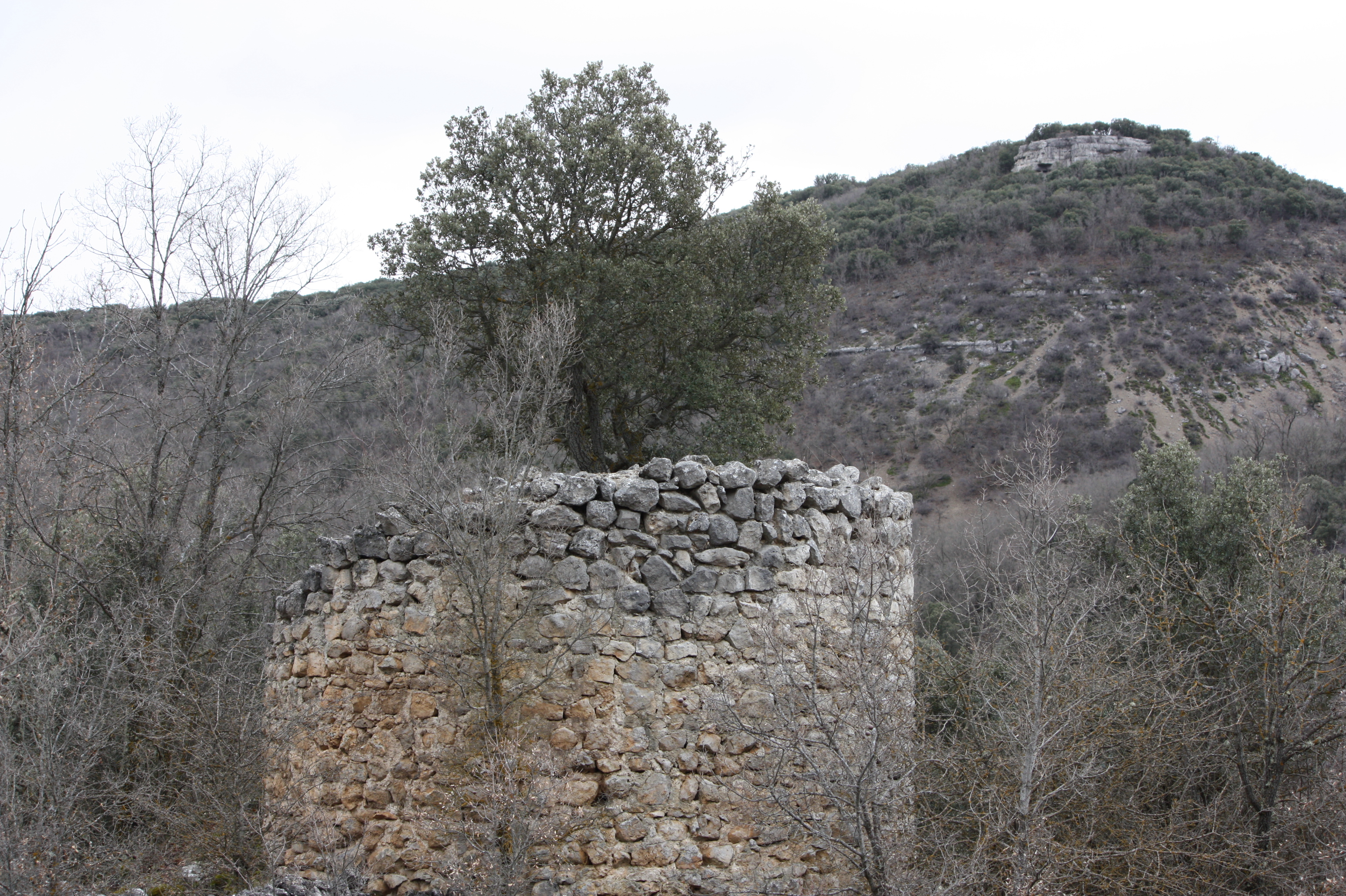 Torrevicente Monumento Arquitectura militar Torre CALTOJAR-Bordecorex (Soria)